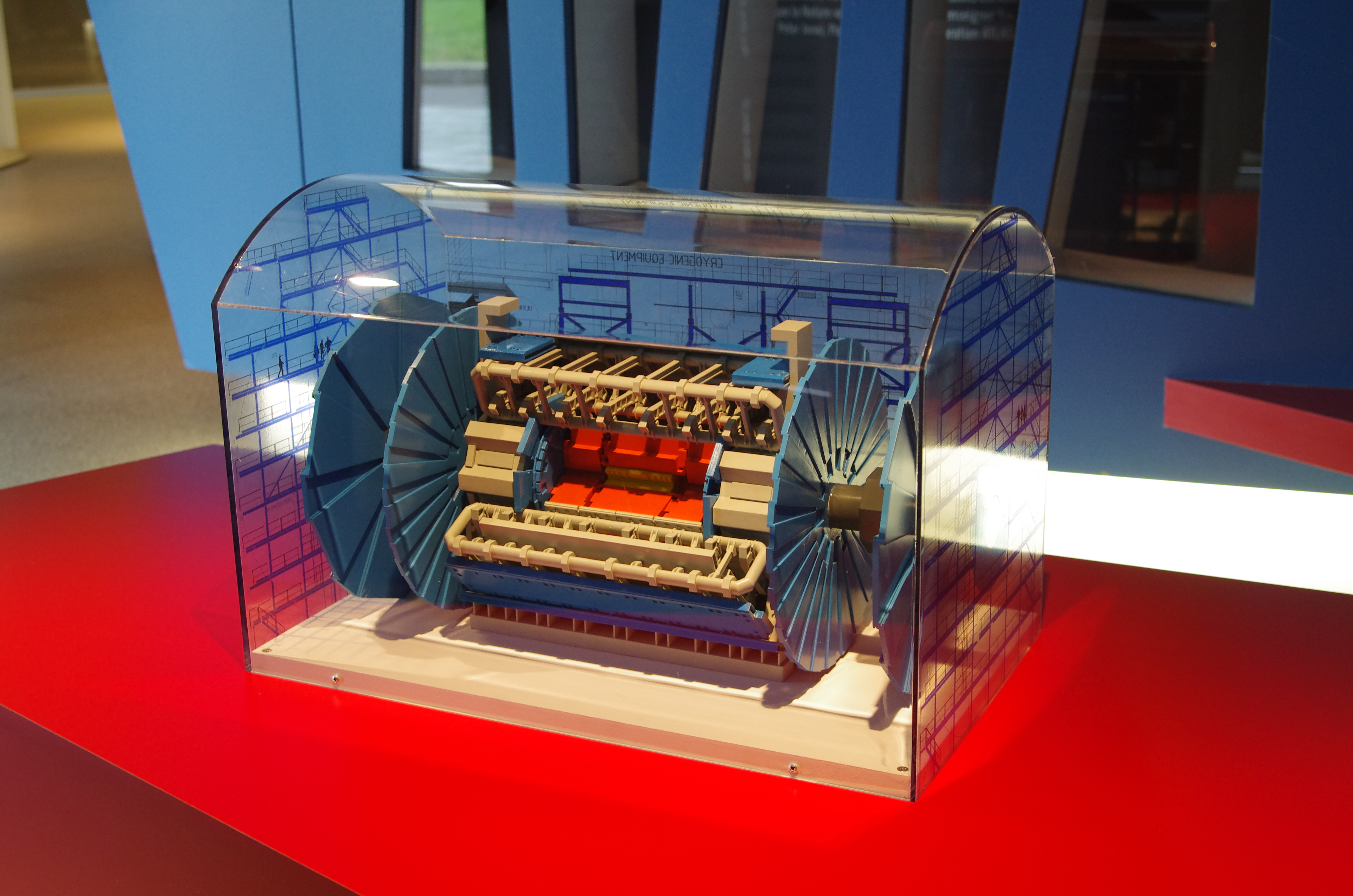 Maquette de l'expérience ATLAS